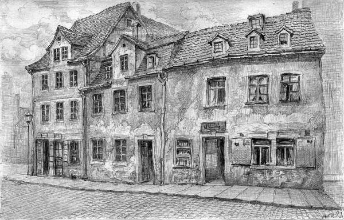 Bleistiftzeichnung einer Häusergruppe in der Seeburgstraße in Leipzig um 1920, Das rechte Gebäude ist das Geburtshaus von Adolph Wagner